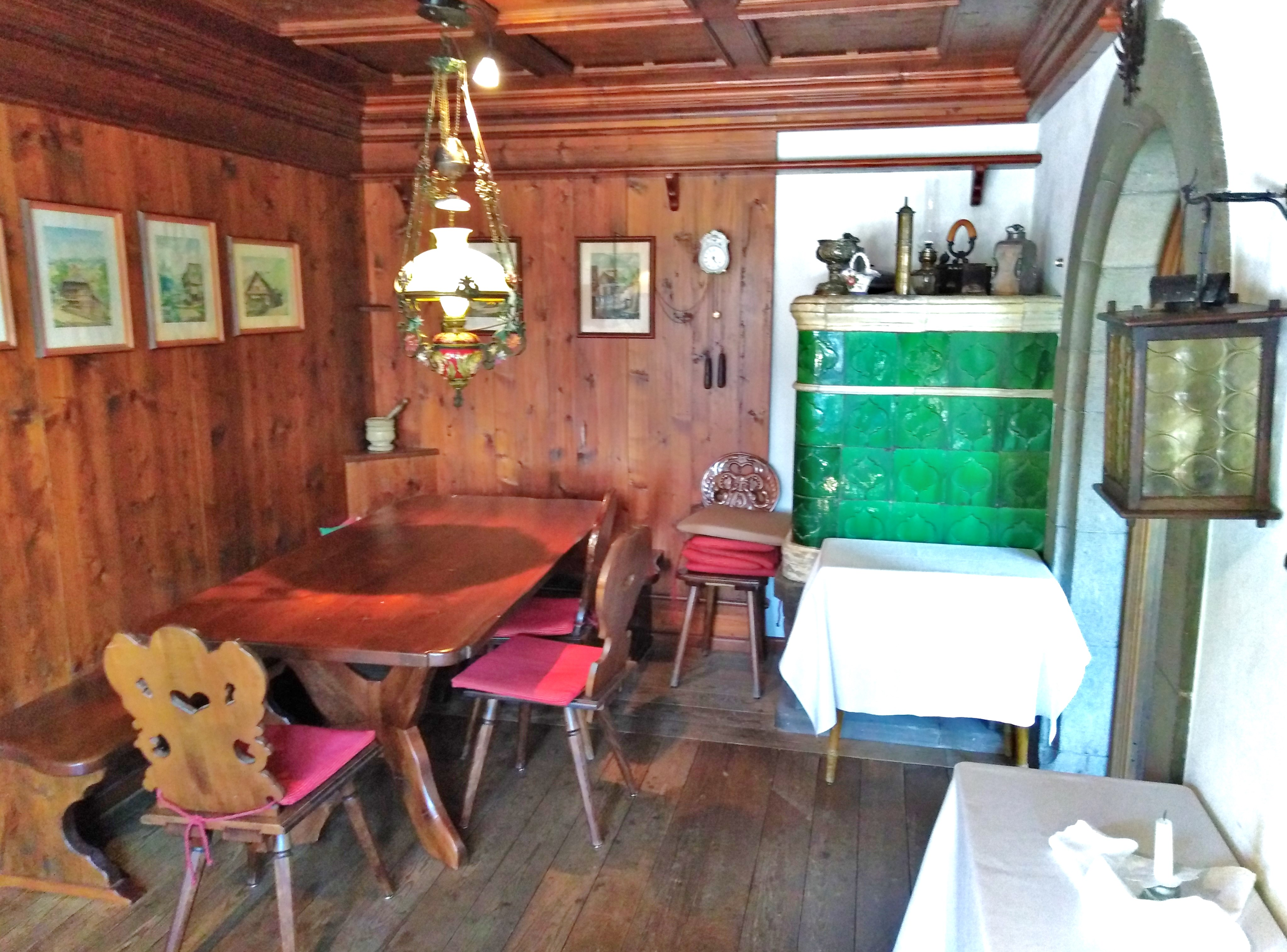 AR.H Gasthof Adler in der Gemeinde Häusern im Landkreis Waldshut in Baden-Württemberg im Südschwarzwald. Der Gasthof führt einen Doppeladler (als Schwarzwaldhaus 1596 nachweisbar). Seit 1966 wird das Restaurant Adler Häusern mit einem Michelin Stern ausgezeichnet. Es gilt als das älteste Sternerestaurant Deutschlands. Die ursprüngliche “Stube” im Gasthaus.